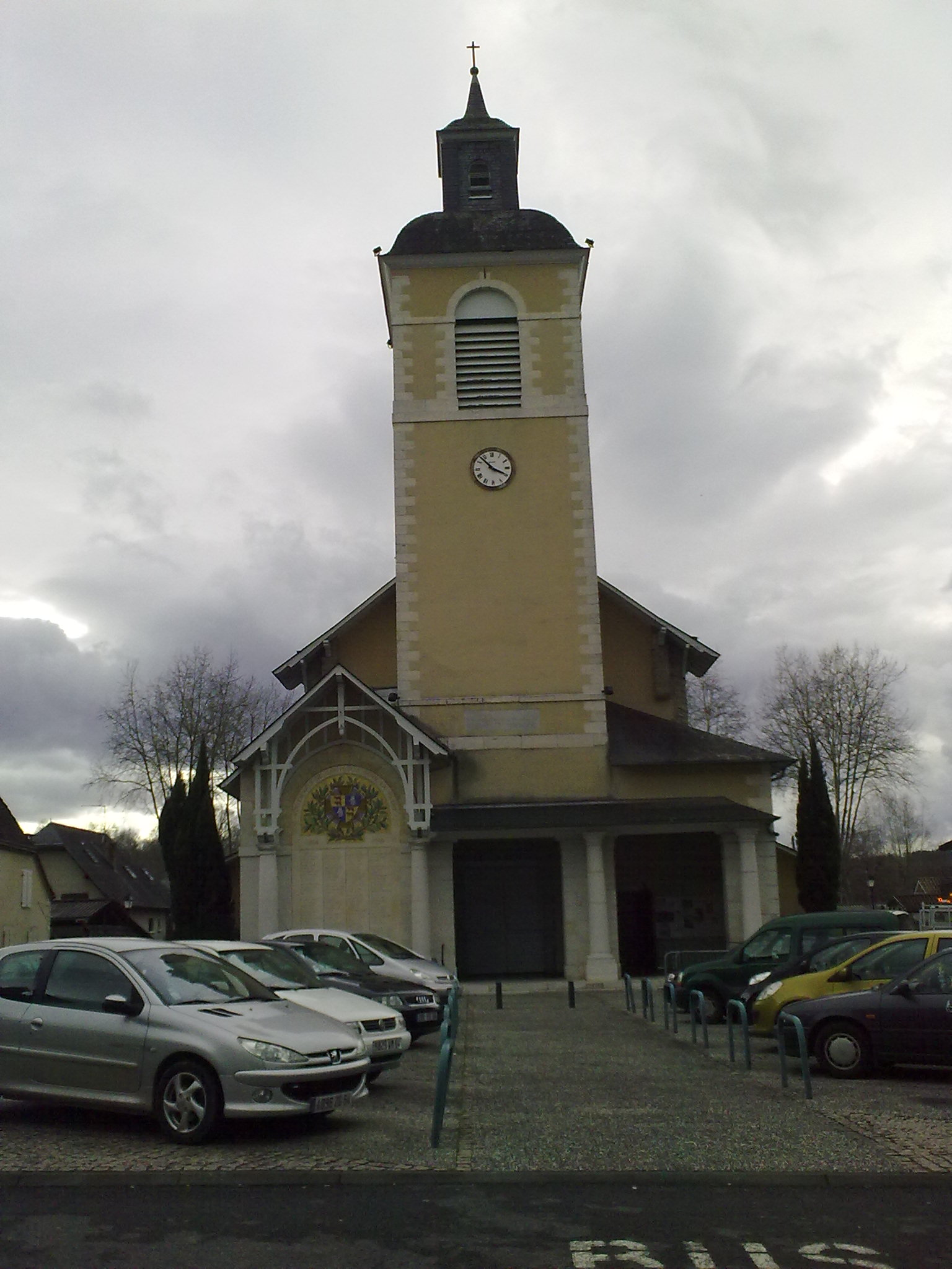 Eglise de Gan